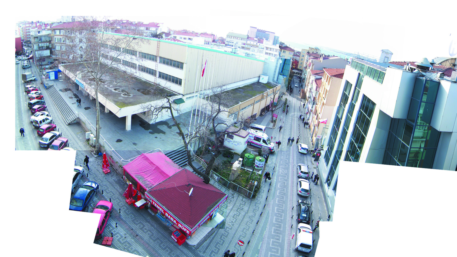 caferaga spor salonu